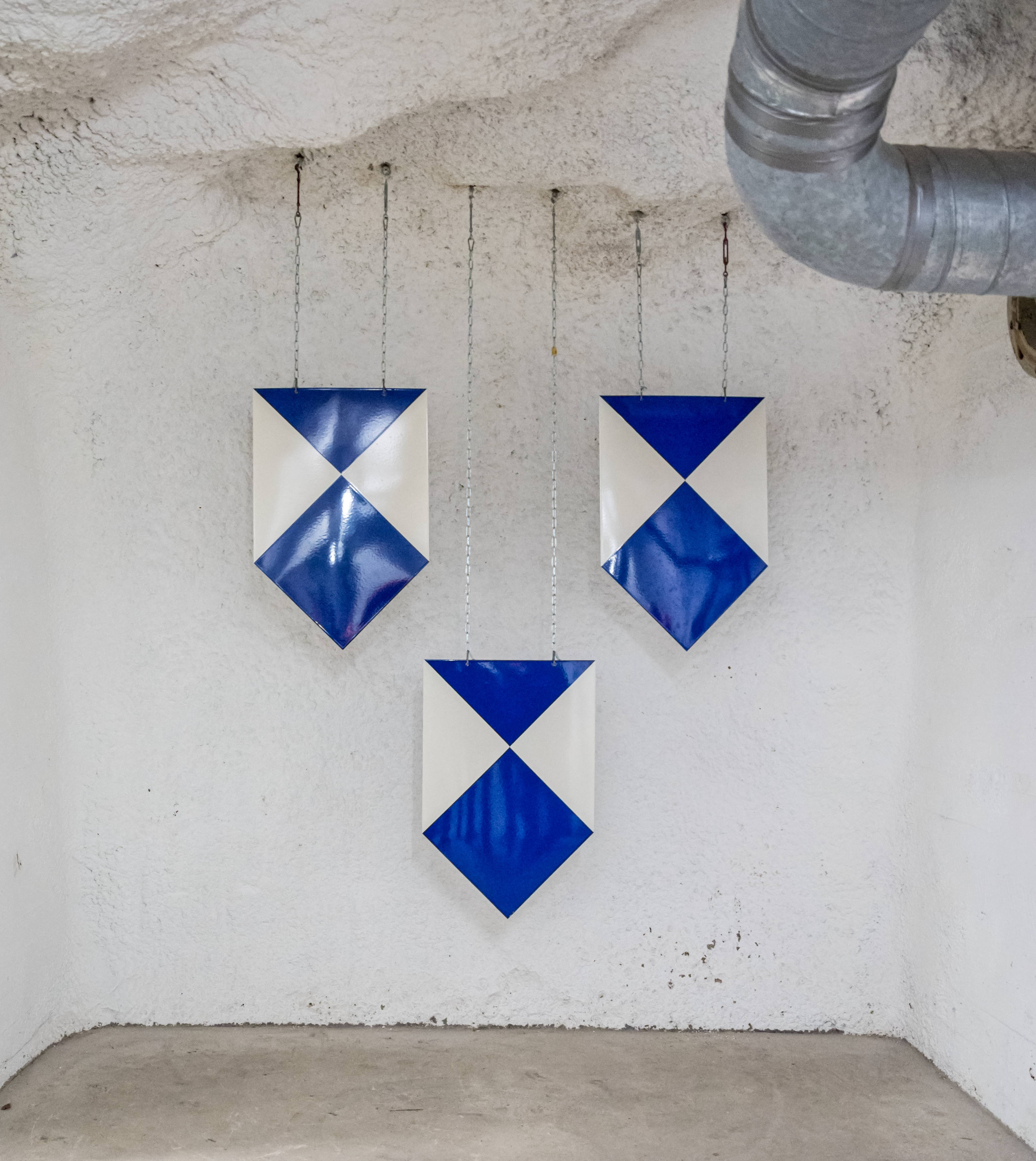 Der Barbarastollen ist der Zentrale Bergungsort der Bundesrepublik Deutschland zur Lagerung von fotografisch archivierten Dokumenten mit hoher national- oder kulturhistorischer Bedeutung. Er ist in Europa das größte Archiv zur Langzeitarchivierung. Die Bilder sind im Rahmen einer Führung des Bundesamts für Bevölkerungsschutz und Katastrophenhilfe (BBK) entstanden - Wikipedia Stammtisch,das 113. Treffen am 30. Mai 2016 Im Zugangsbereich zu den Räumen A und B ist das Schutzzeichen in dreifacher Form als Zeichen des höchsten Schutzes angebracht